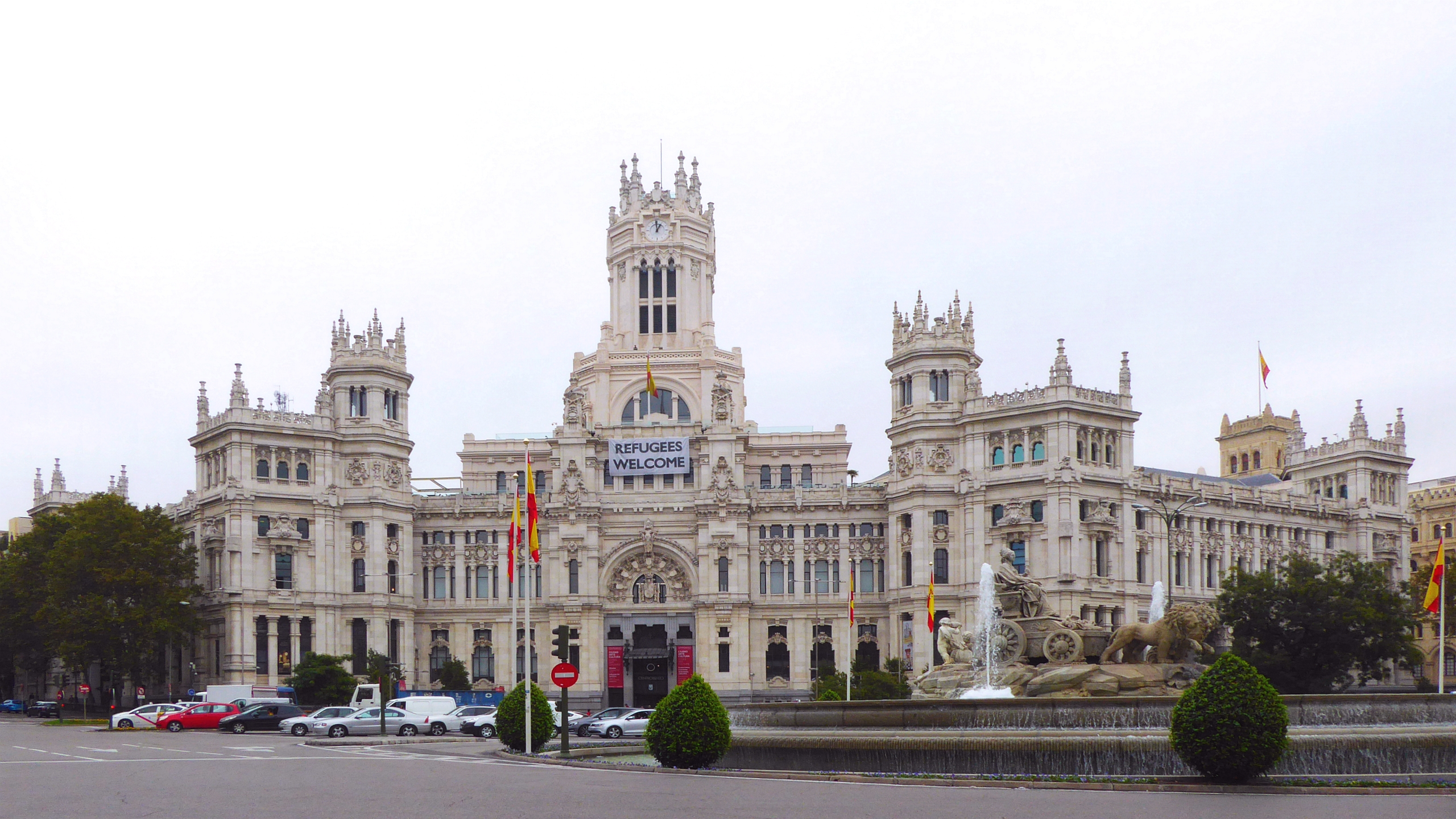 der Brunnen Fuente de Cibeles vor Palacio de Cibeles (1919), heute "Palacio de Comunicaciones" bzw. "CentroCentro", am Paseo del Prado in Madrid . Foto Wolfgang Pehlemann P1150258